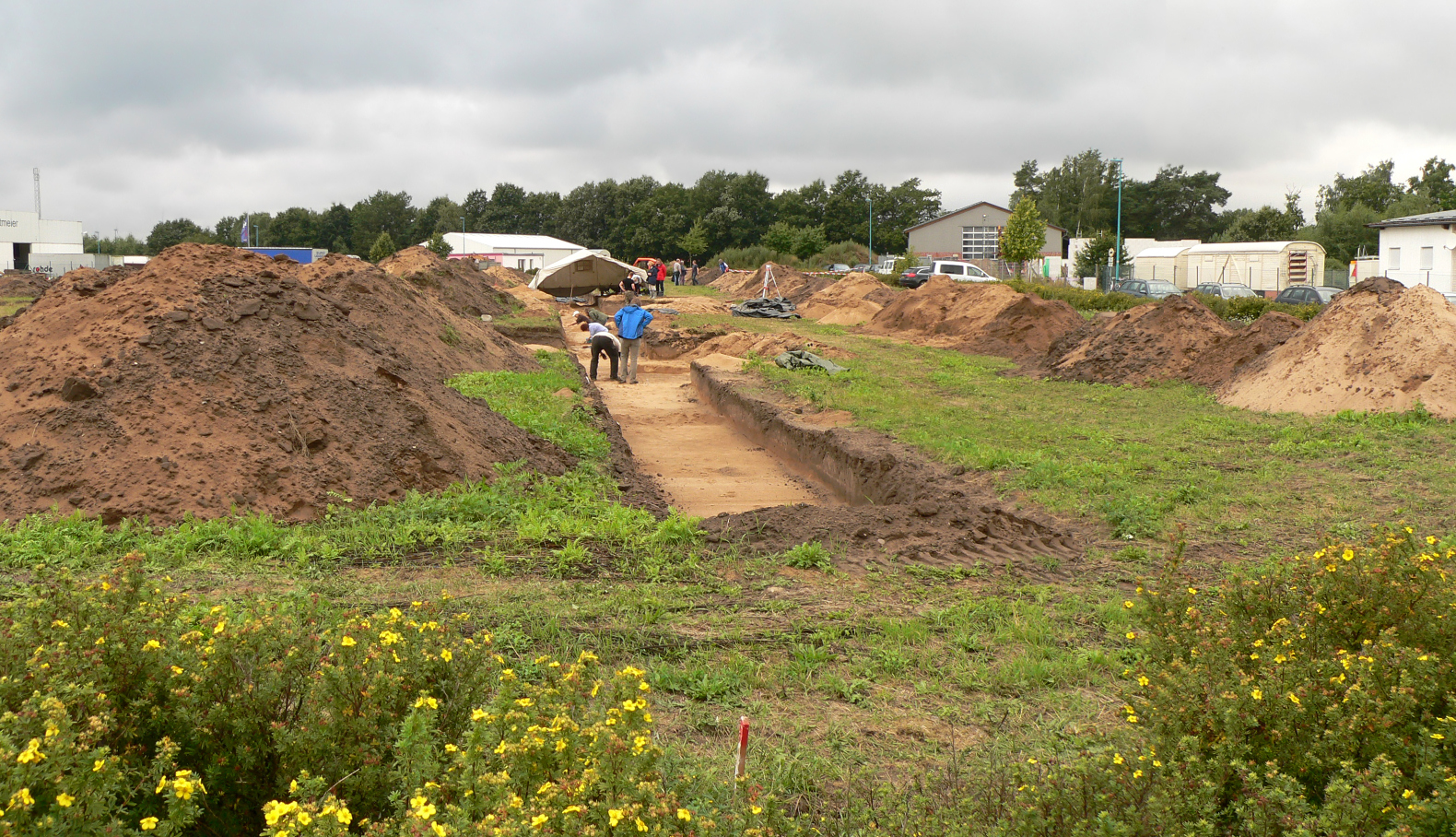 Ausgrabung Gewerbegebiet Lemke